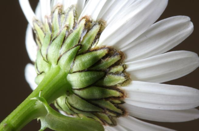 Margherita diploide – Località: Villa Prima, Limana (BL), 350 m s.l.m.